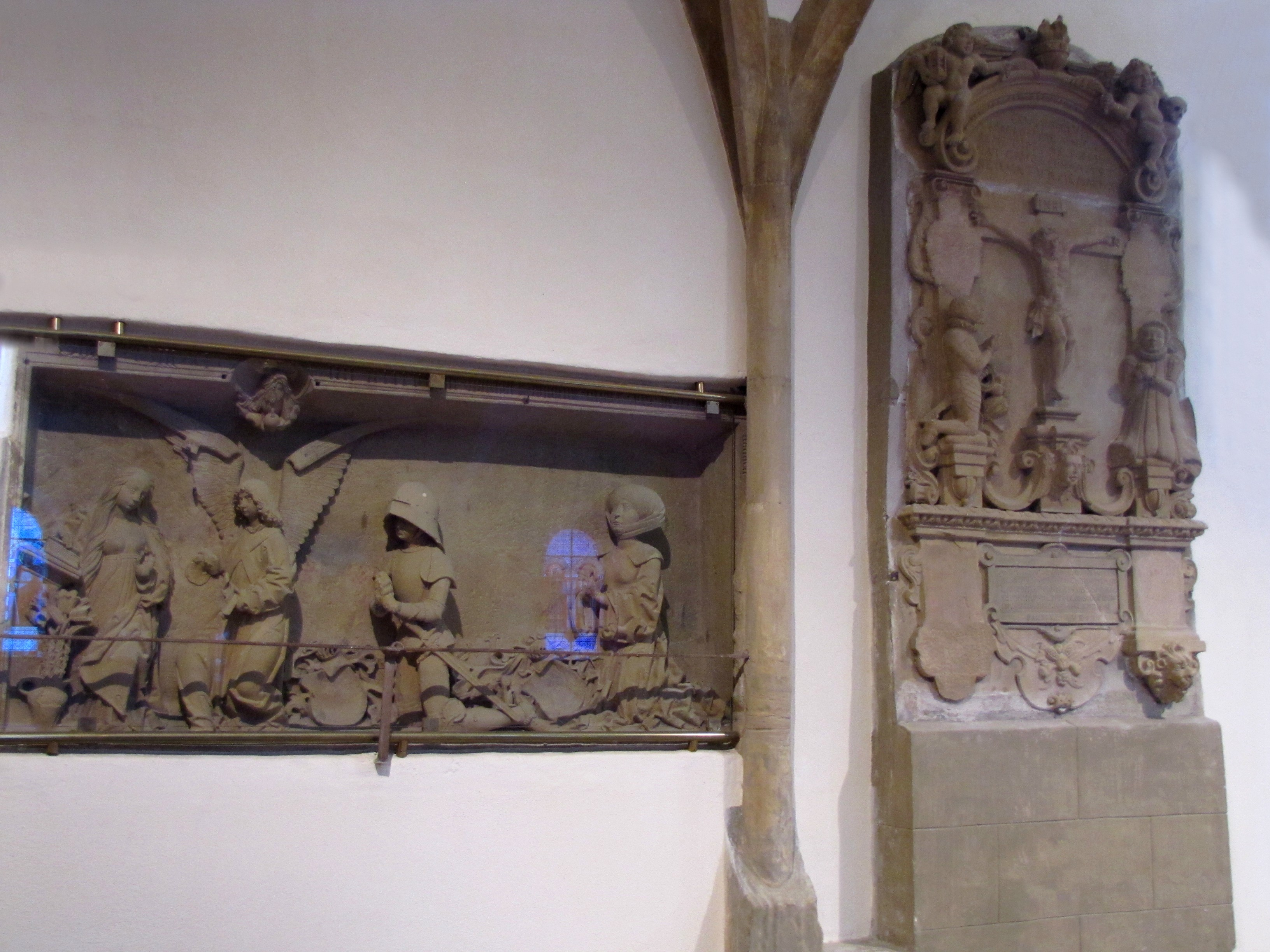 Alsace, Haut-Rhin, Église Saint-Sébastien de Soultzmatt (PA00085689, IA68004357).Monument sépulcral de Wilhelm Capler et de sa femme Adelaïde (1495): This object is classé Monument Historique in the base Palissy, database of the French furniture patrimony of the French ministry of culture, under the references PM68000358 and IM68007636. Monument sépulcral de Jean-Christophe de Breitenlandenberg et de sa femme Ursule (1616): This object is classé Monument Historique in the base Palissy, database of the French furniture patrimony of the French ministry of culture, under the references PM68000356 and IM68007637.